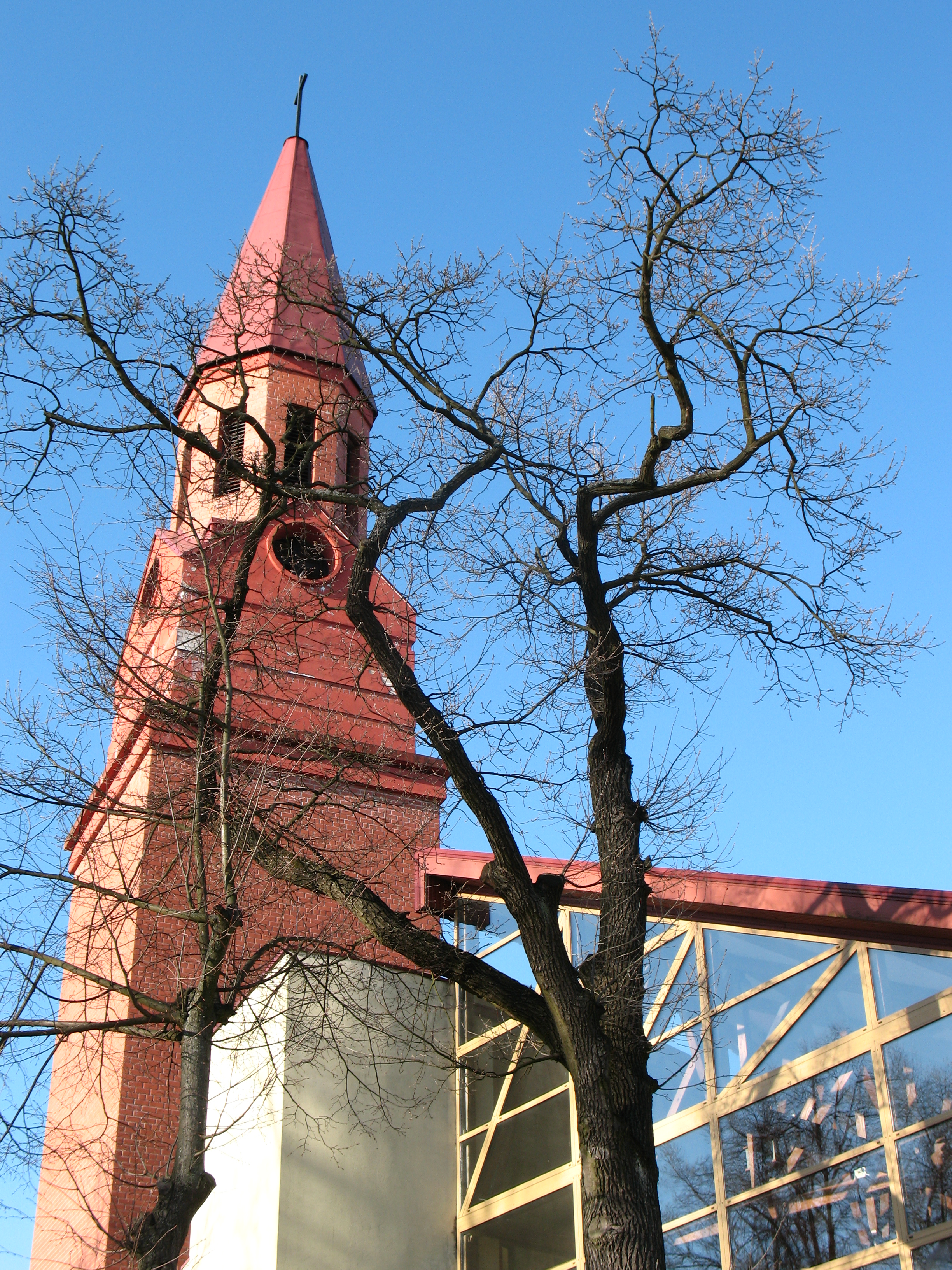 Католическая церковь, г. Советск, Калининградская область